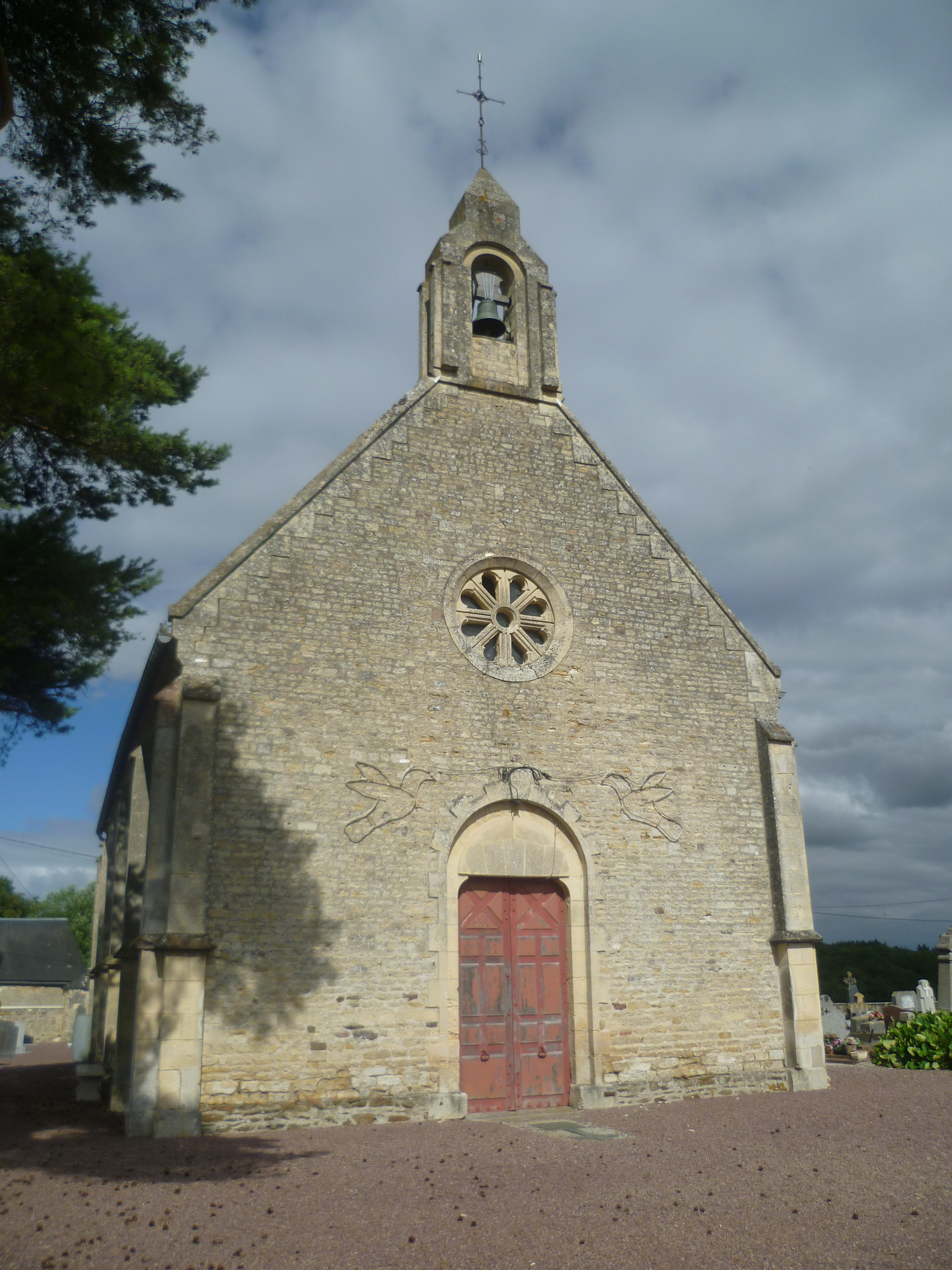 Eglise de Tourville-sur-Odon